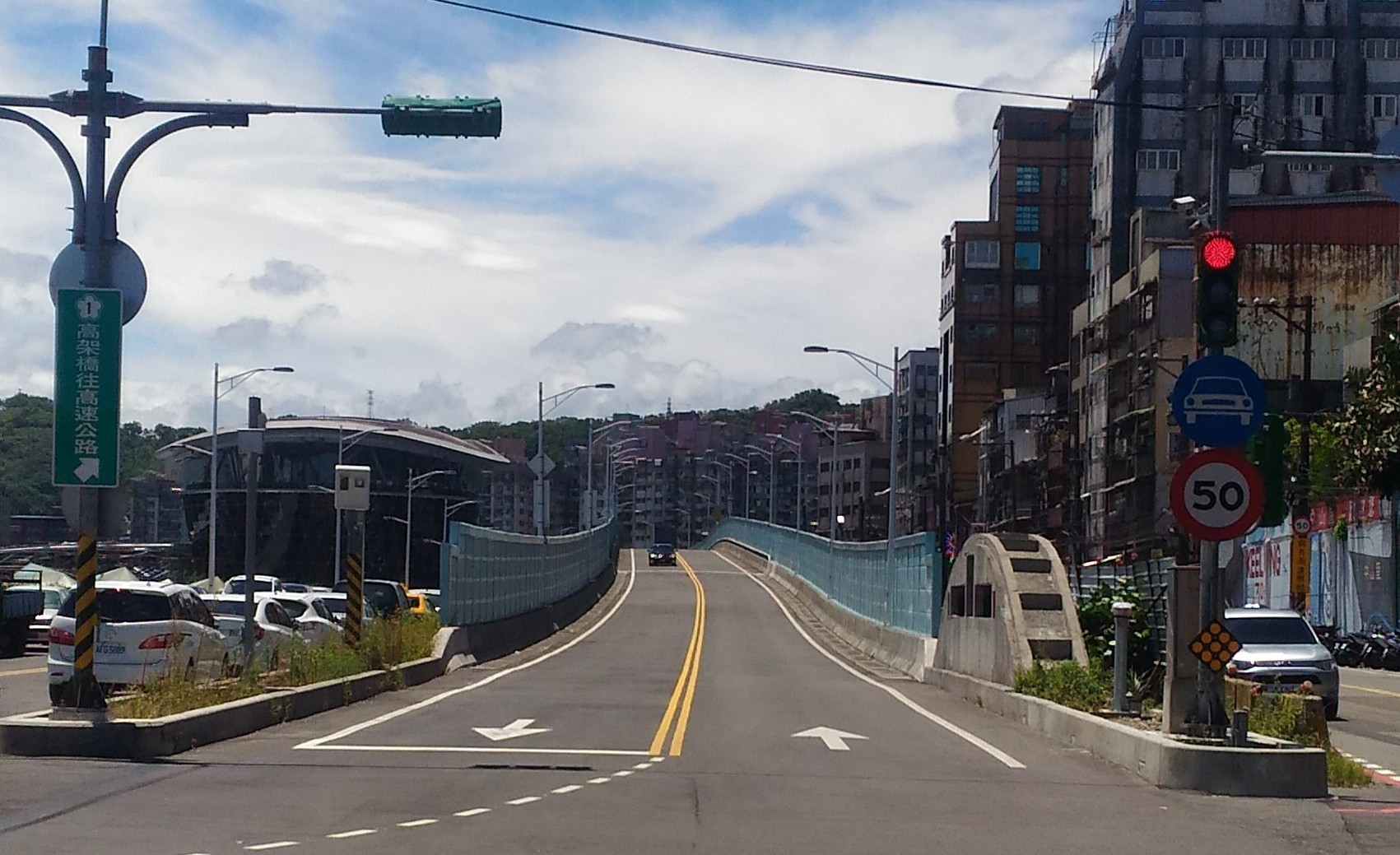 中文（台灣）: 基隆港西高架橋入口